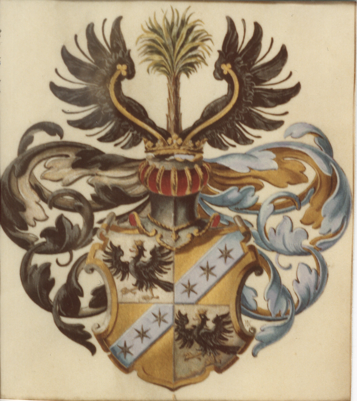 Wappen